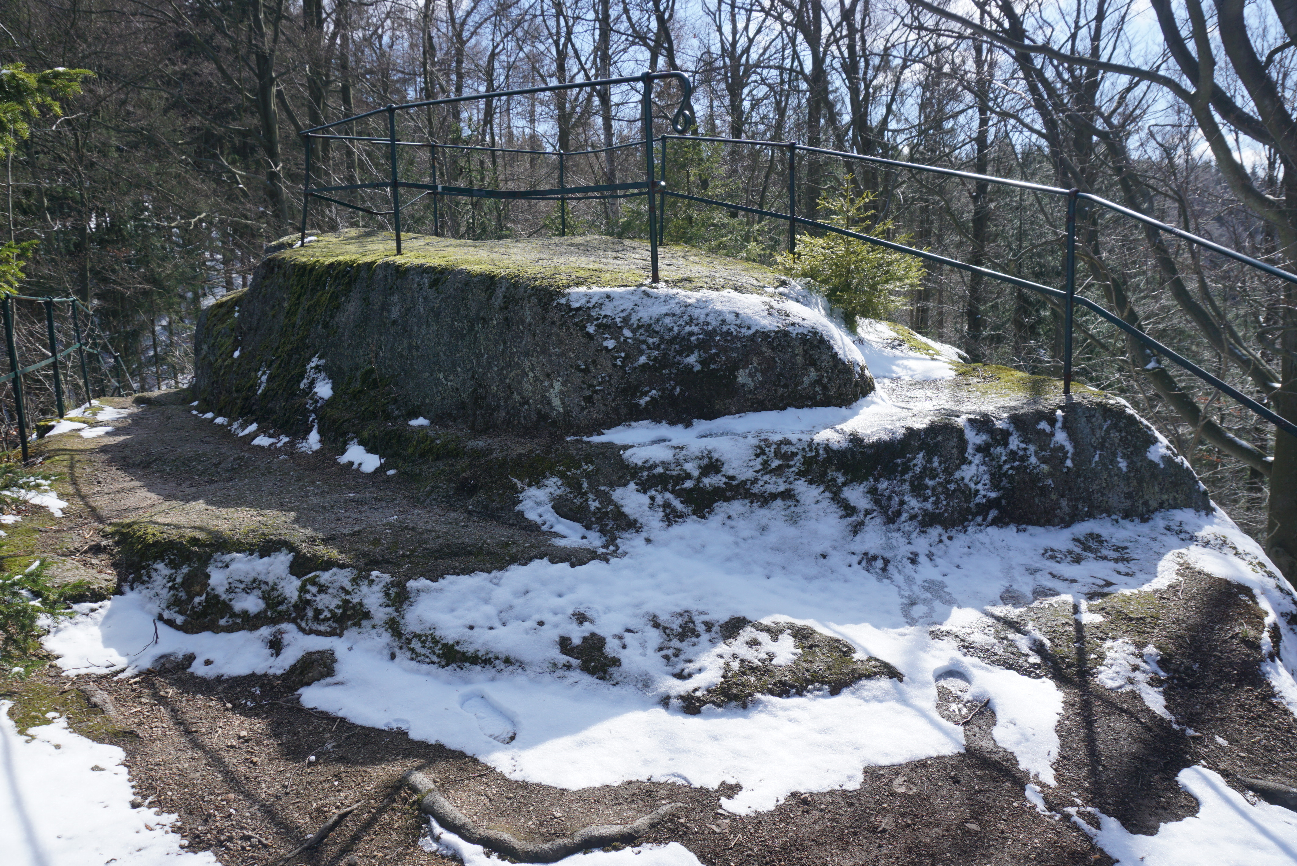 Jezdec (Reitstein) - pozůstatky skalního hrádku nad Kateřinkami u Liberce